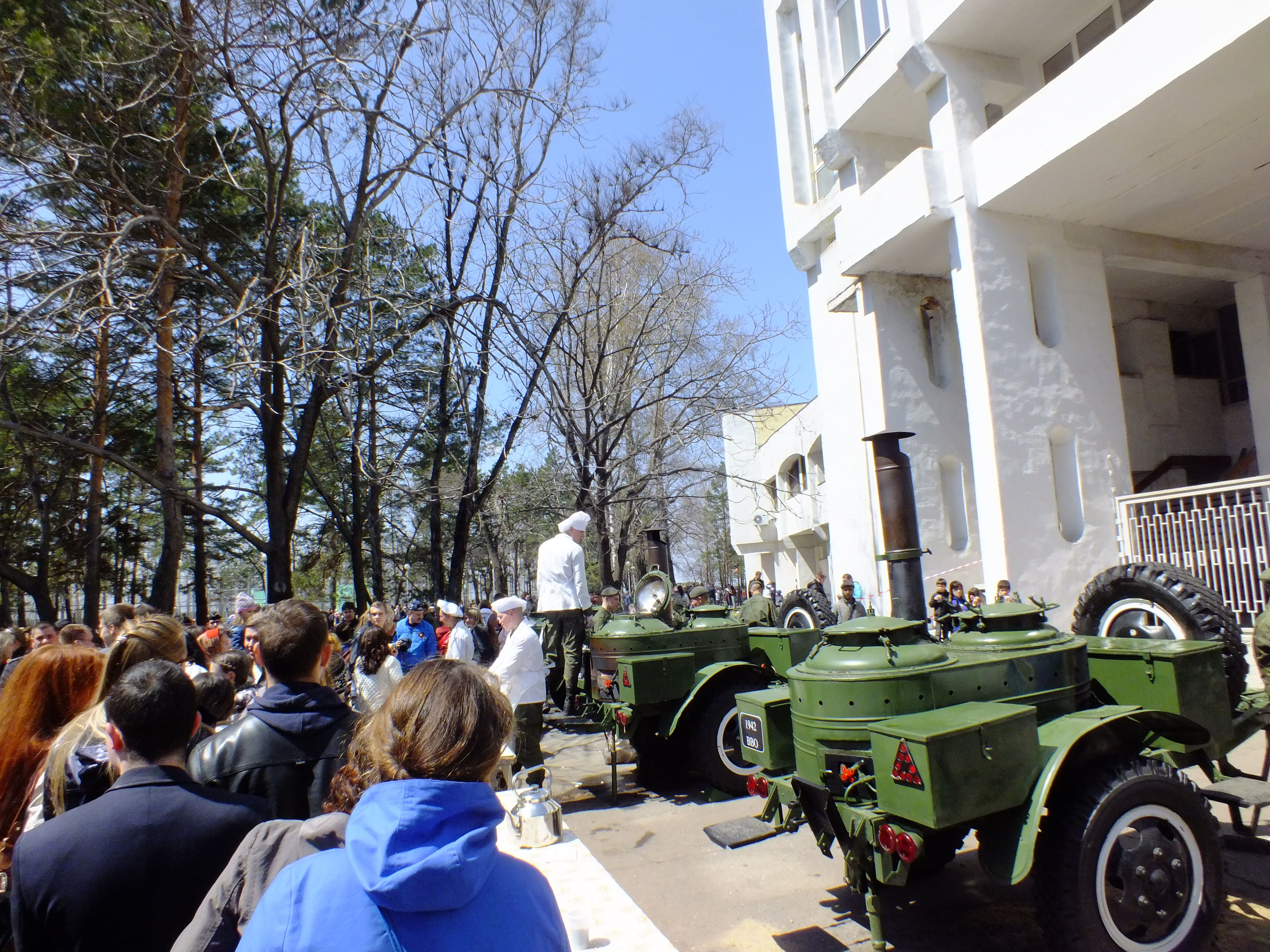 Воины Восточного военного округа угощают хабаровчан солдатской кашей 9 мая 2015